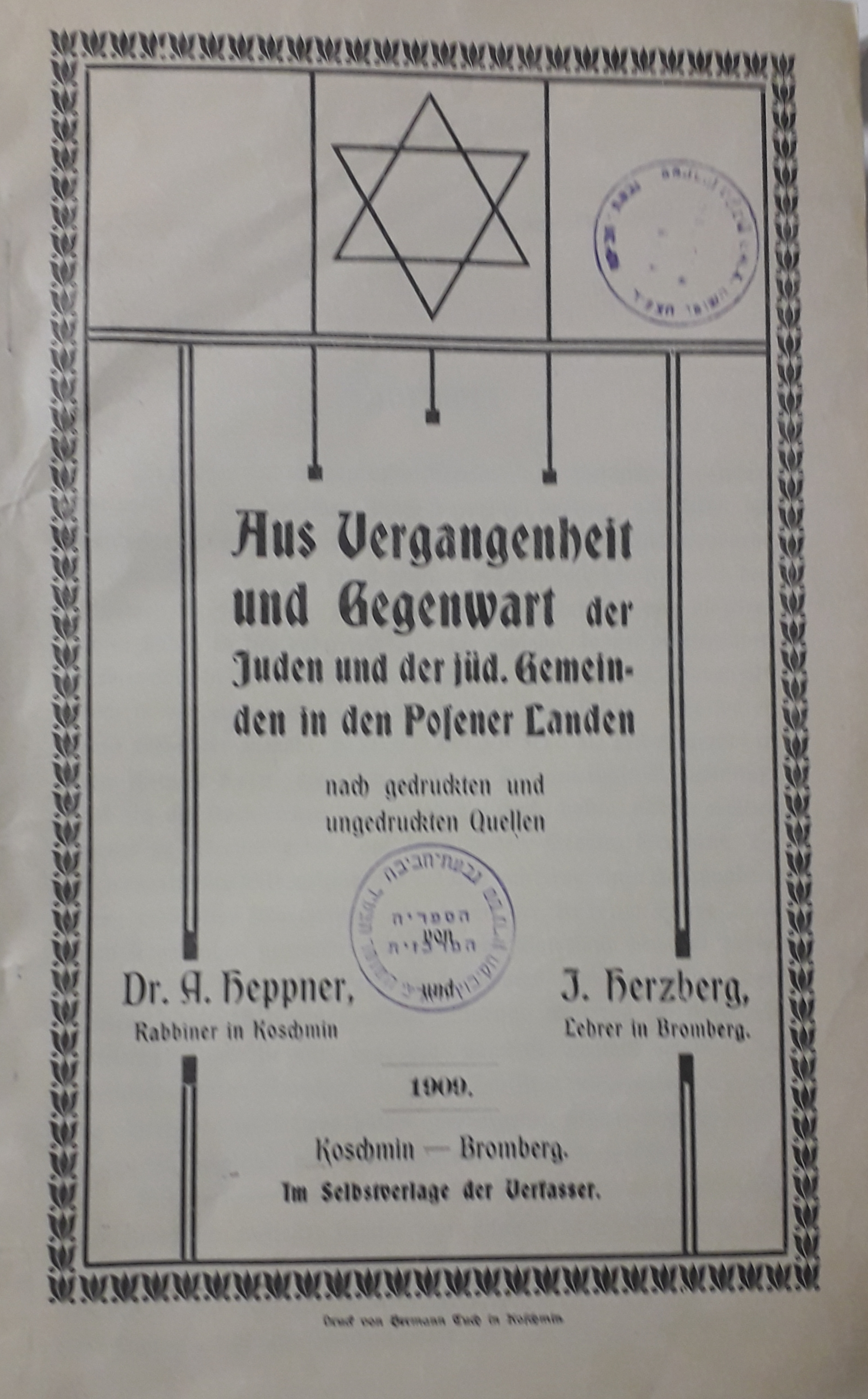 עמוד השער של מחקרו של הרב ד"ר הפנר (HEPPNER, ARON) על הקהילות היהודיות בשלזיה